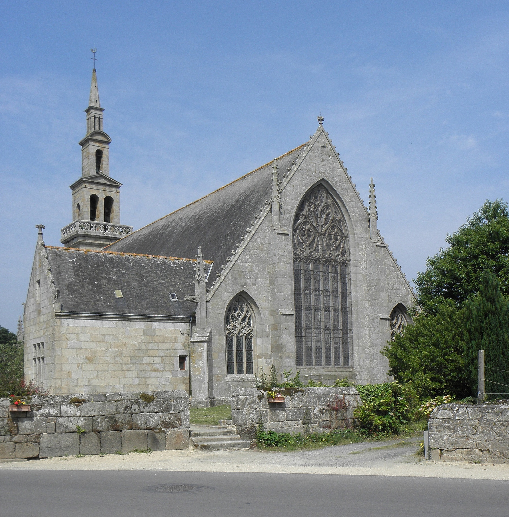 Chevet de la collégiale Saint-Pierre de Tonquédec (22).